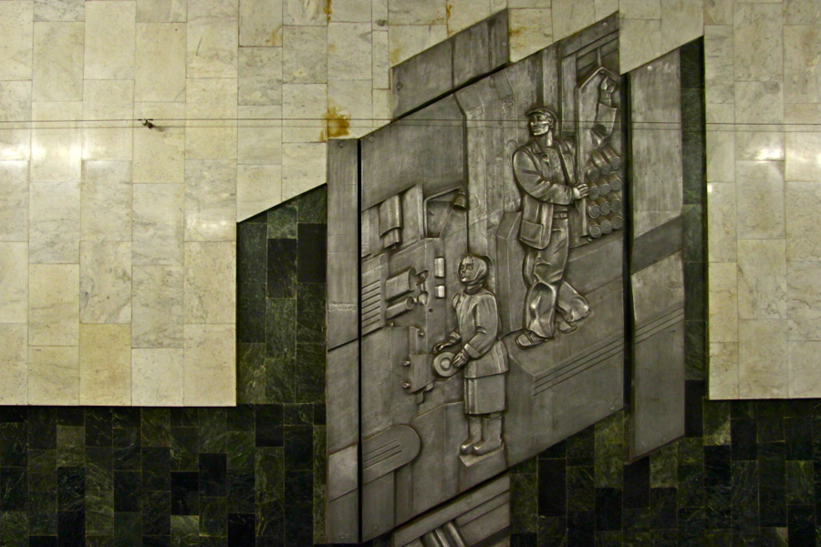 Yekaterinburg Metro (Екатеринбургский метрополитен)